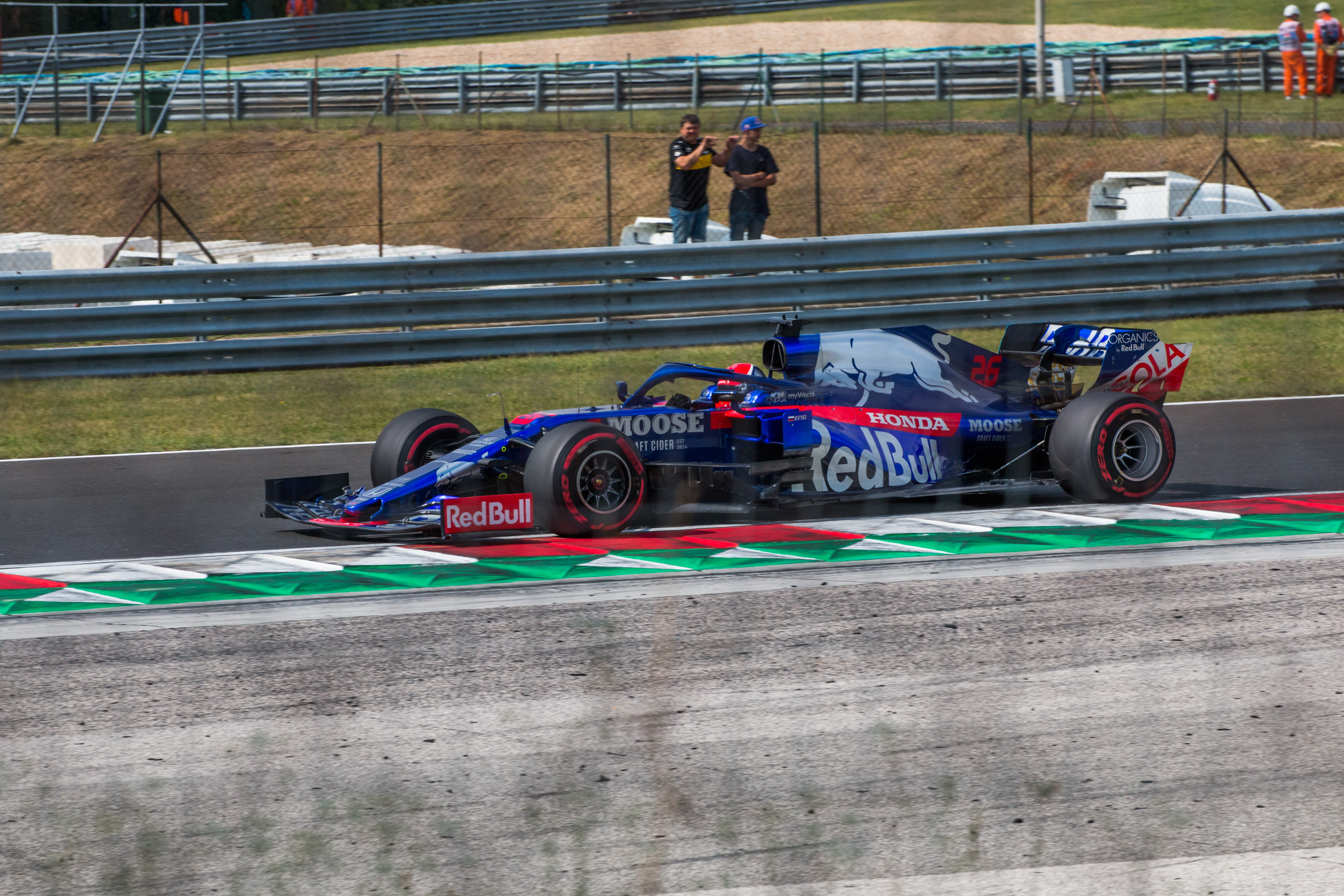 Daniil Kvyat in his Toro Rosso STR14 during Formula 1 Hungarian Grand Prix 2019 Qualification session on the Hungaroring